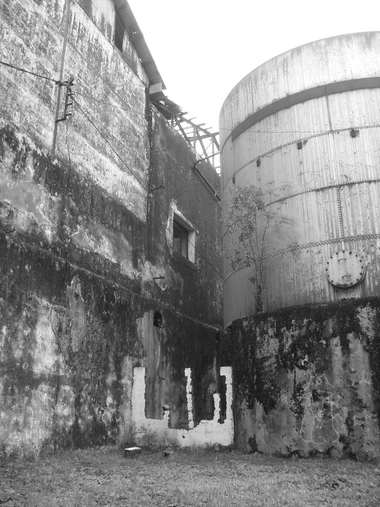 Ancienne usine de Pierrefonds.